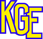 Logo from a canoe-sport club